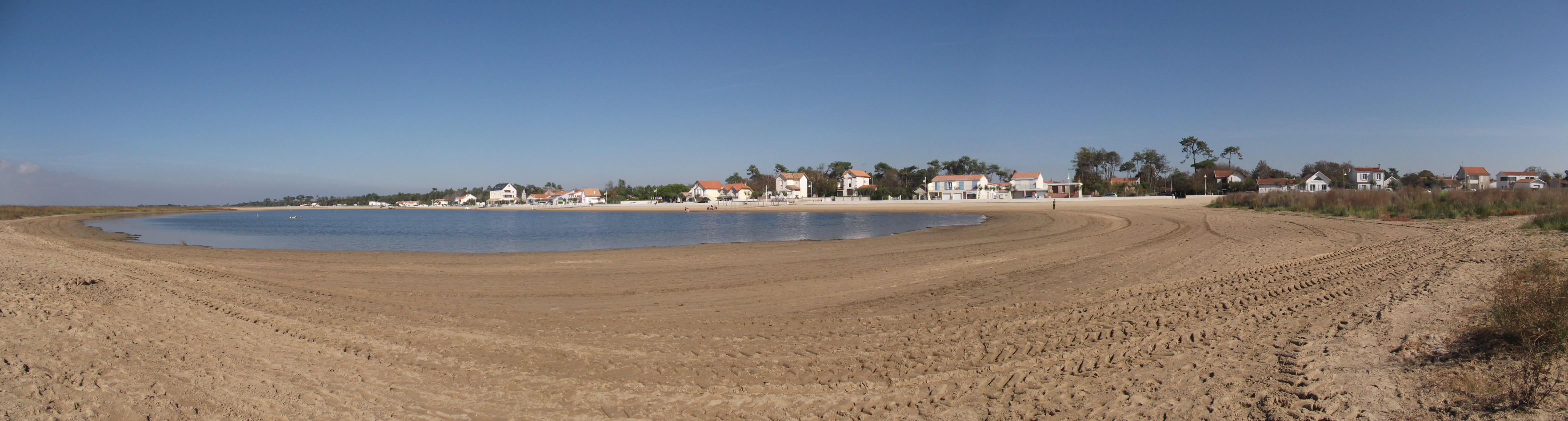 Panorama de Marennes plage